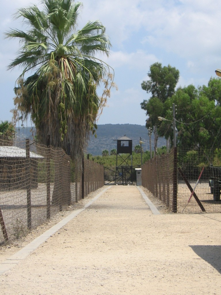 Immigration Museum, Atlit, Israel